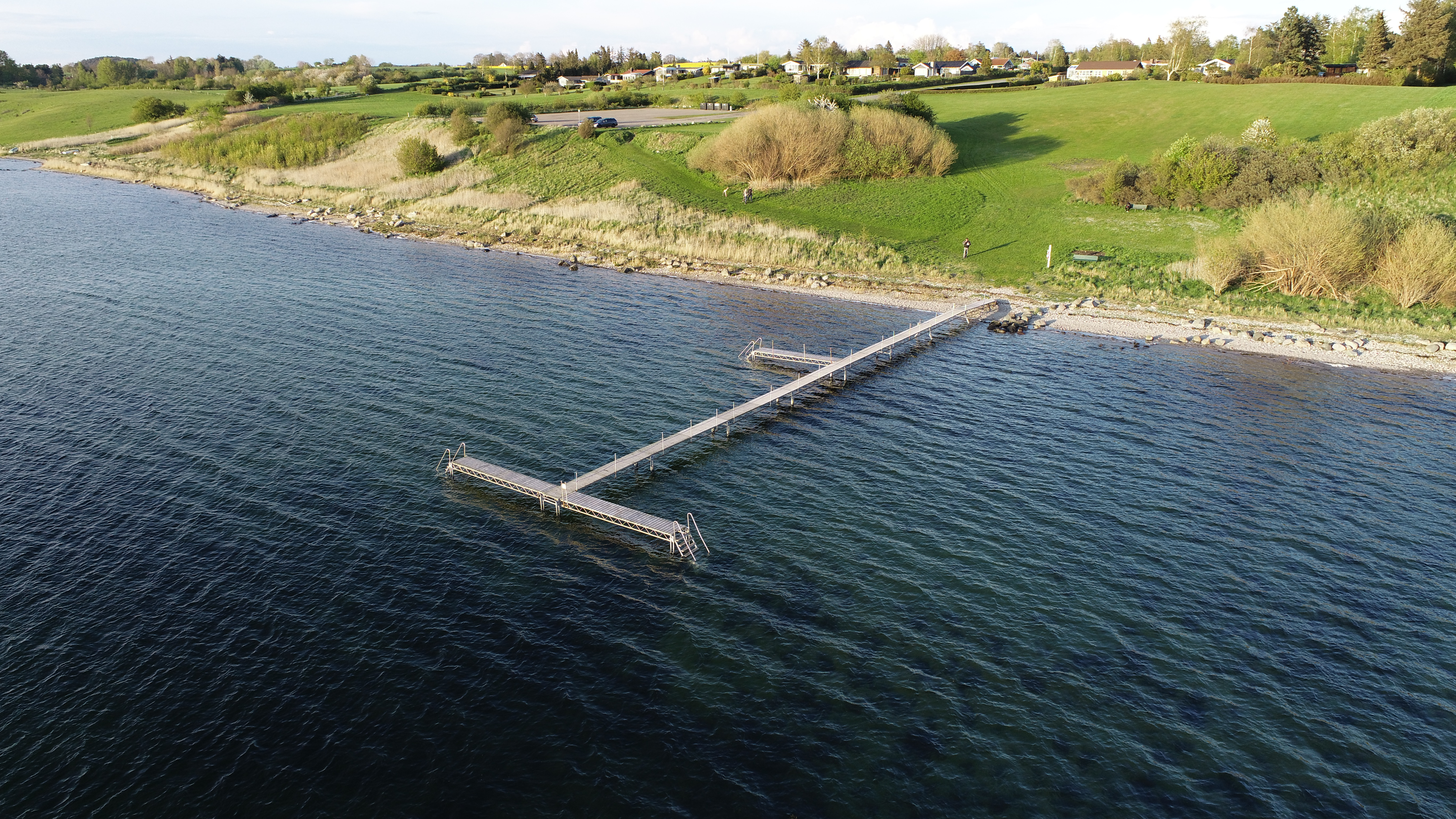 Badeboren ved Vellerup Sommerby